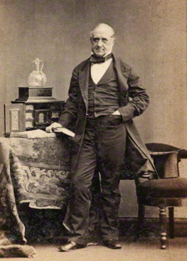 Frederic John Farre